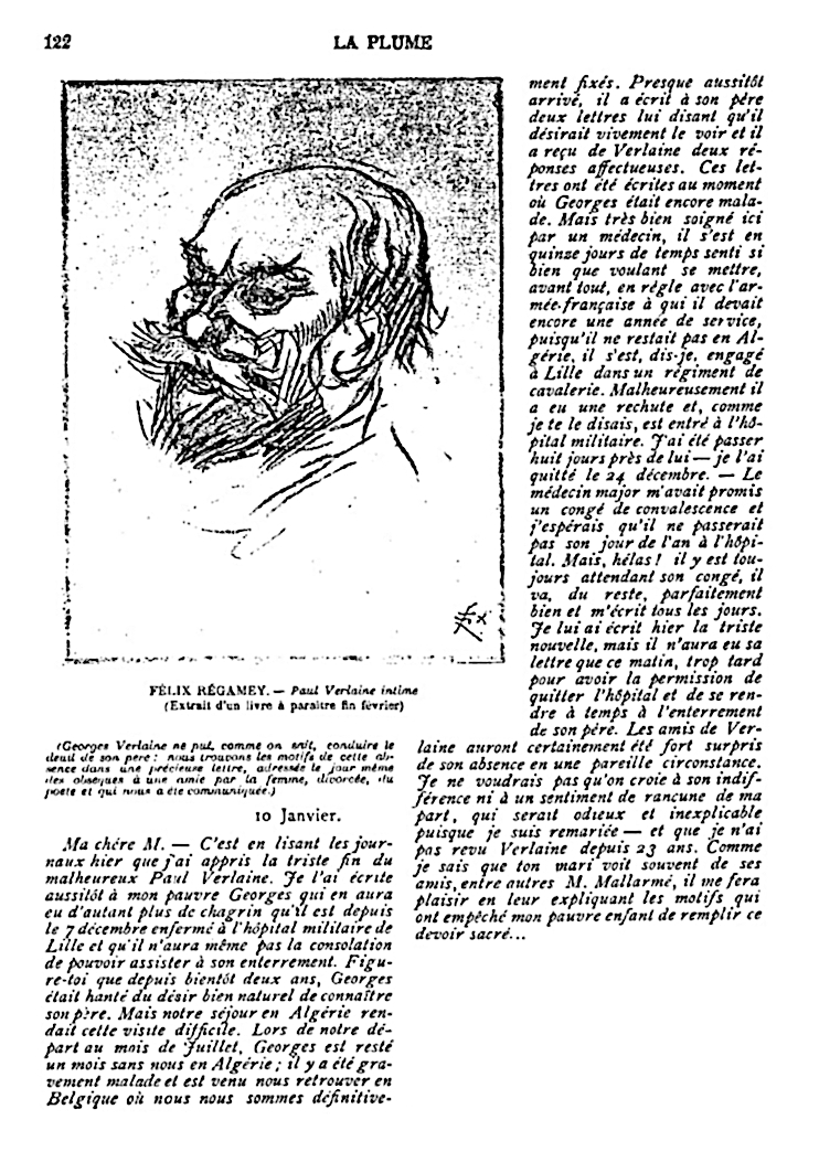 La Plume - Revue Littéraire - 26 février 1896 - Lettre de Mathilde Mauté